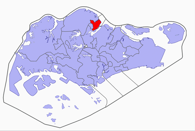 Singapore electoral map, 2006